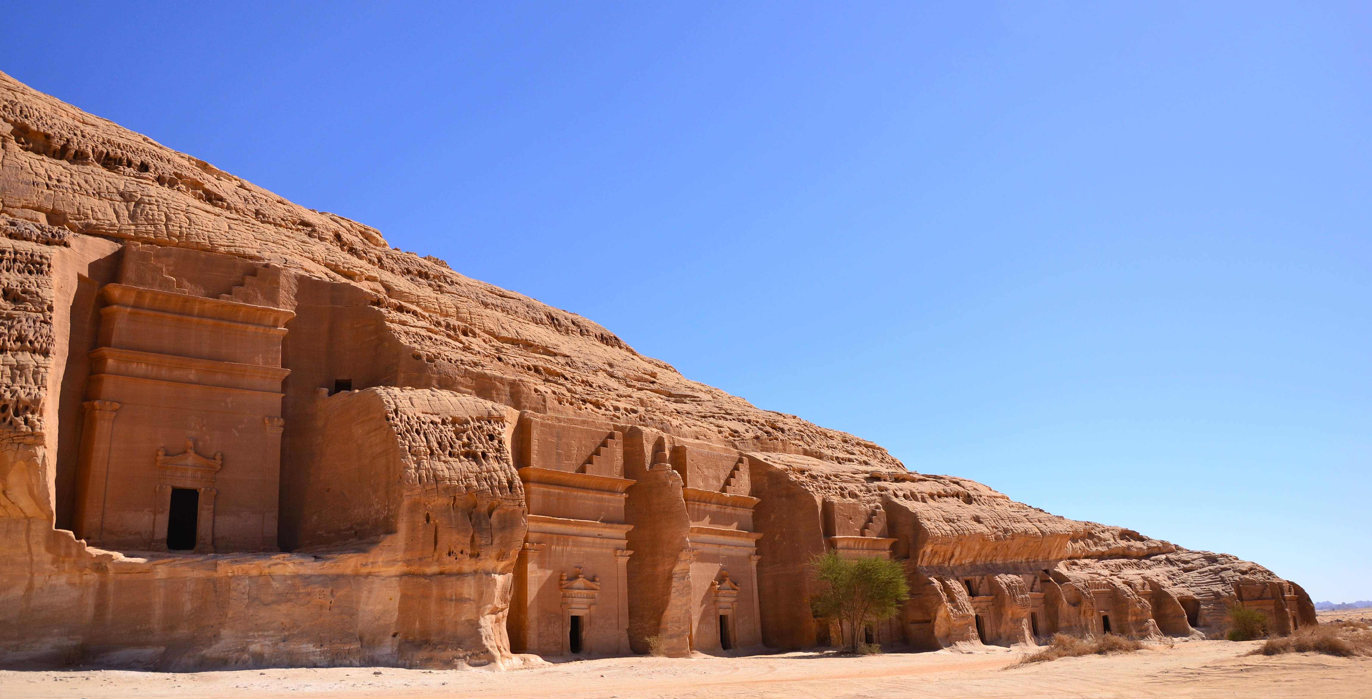 Madain Saleh